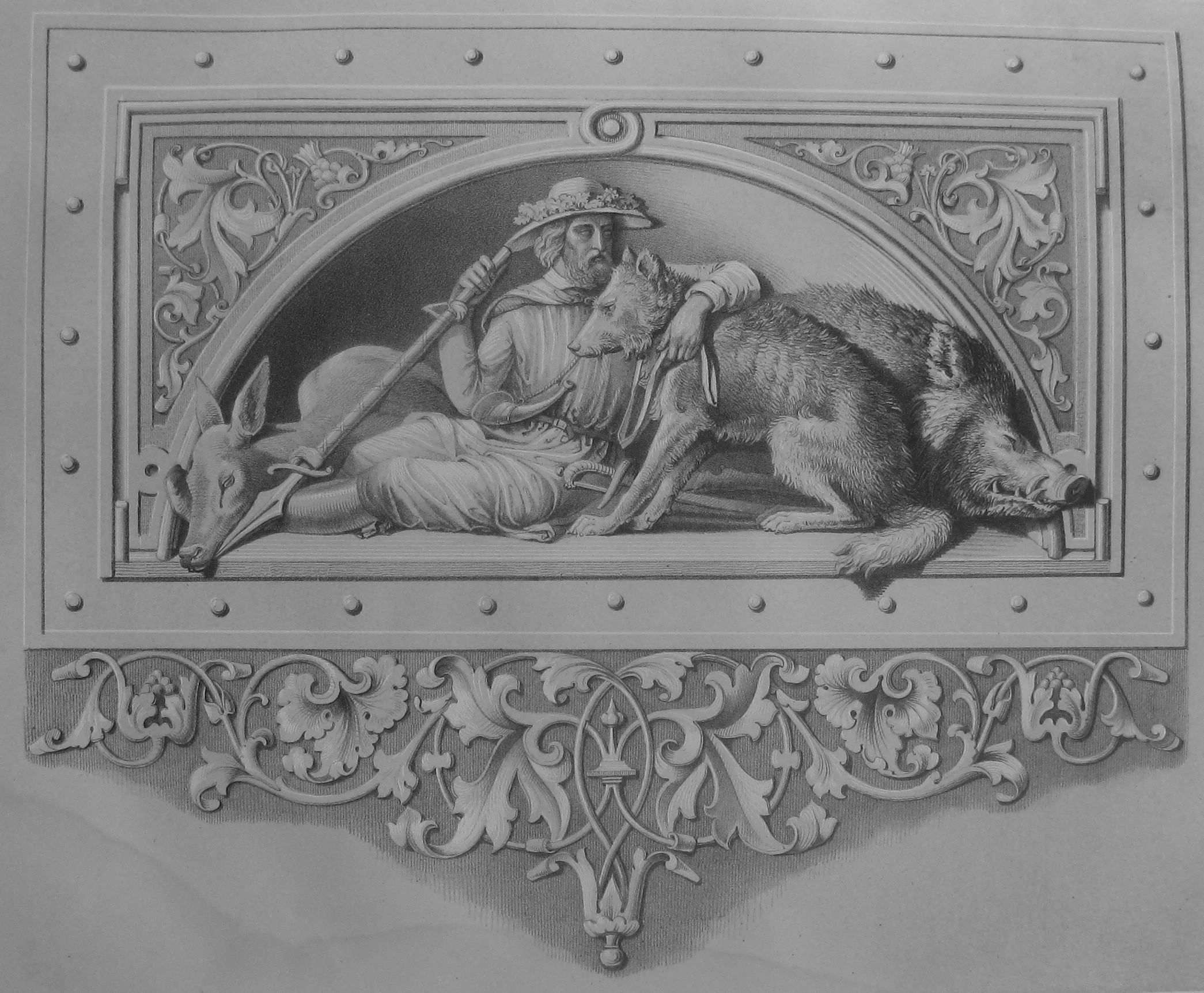 Christian Plock / Lithographie: F. Schlotterbeck: Jägeridylle mit Pflanzenornamenten, Zeichnung, Entstehungsjahr um 1862-1865, Verbleib unbekannt.